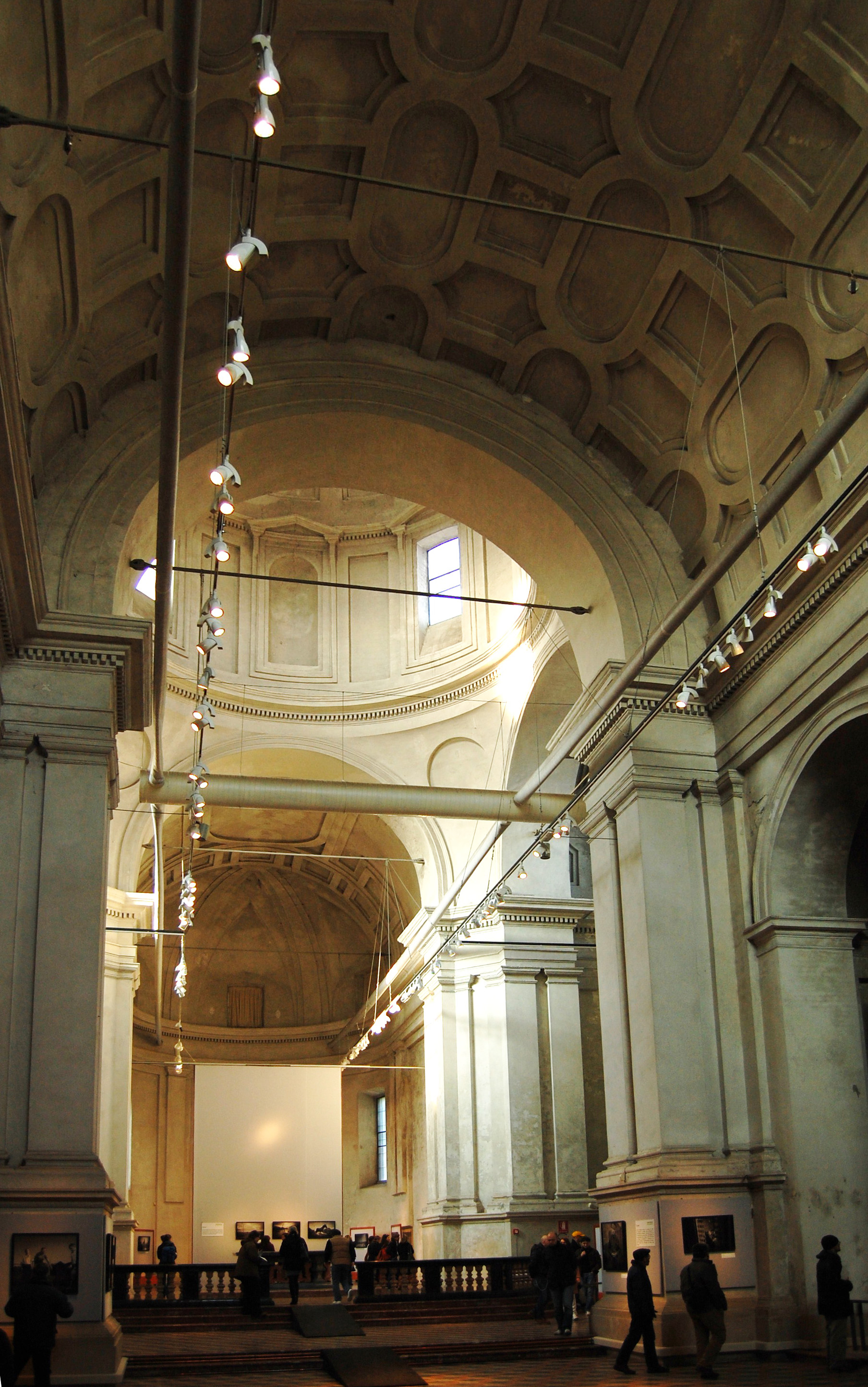 Interno della chiesa sconsacrata di San Cristoforo a Lodi, durante una mostra fotografica